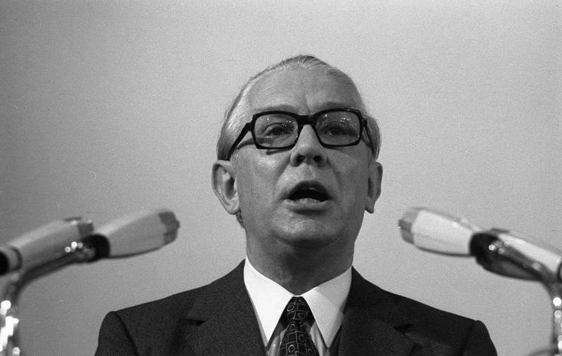 CDU-Parteitag 1972 in der Wiesbadener Rhein-Main-Halle 9.-11.10.1972